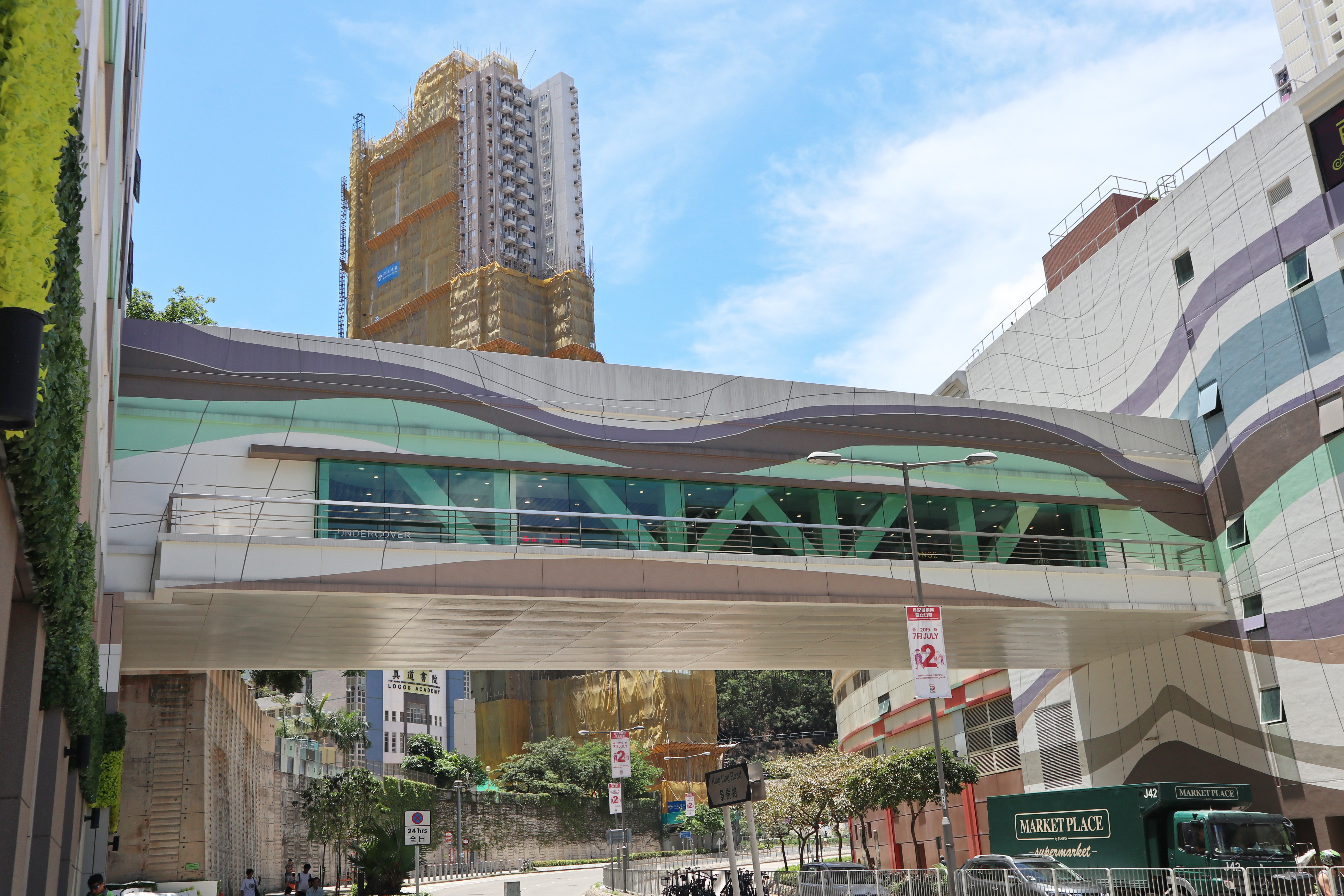 調景嶺彩明商場連接一期至二期行人天橋通道